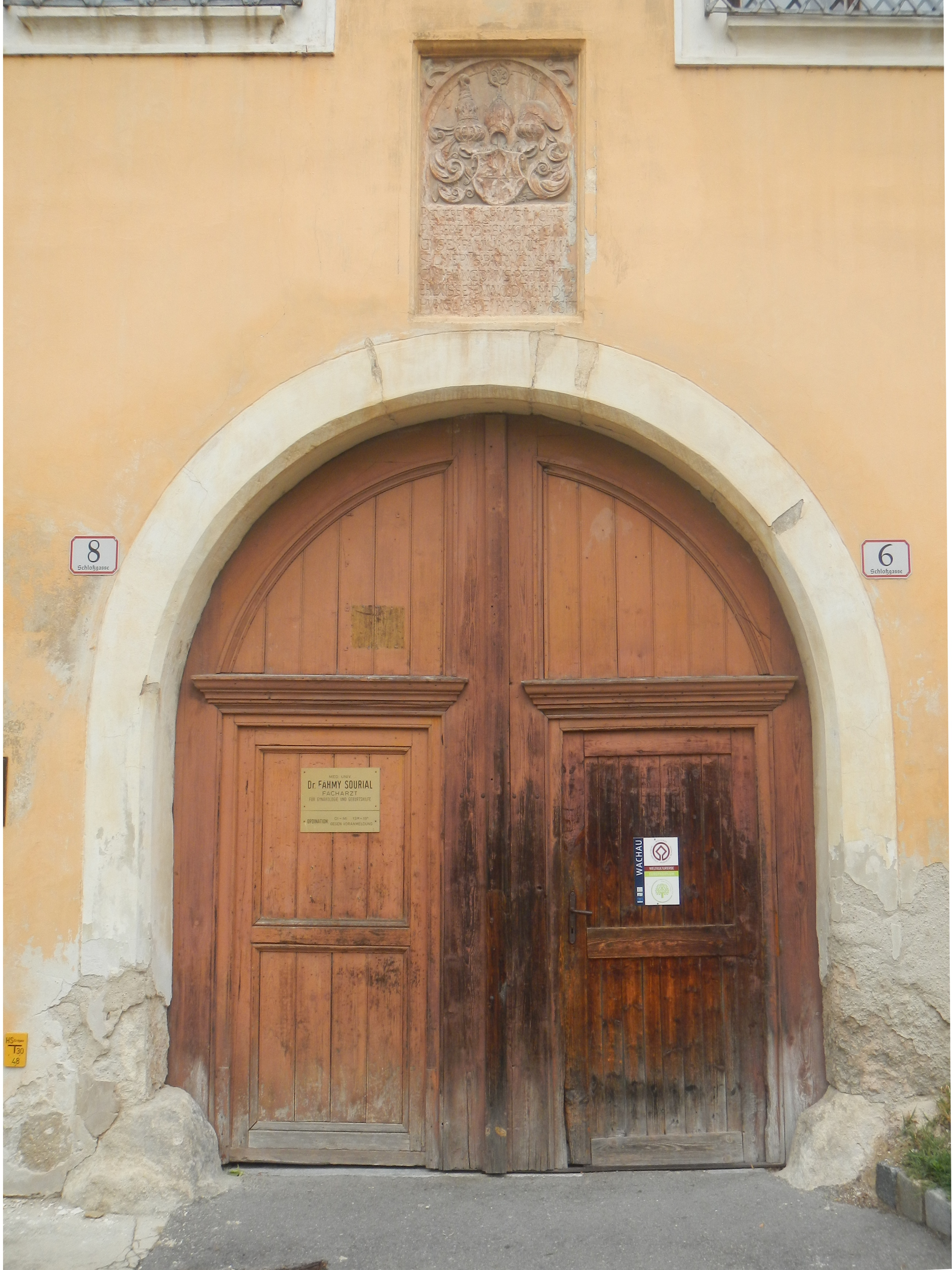 Portal Schloss Mautern